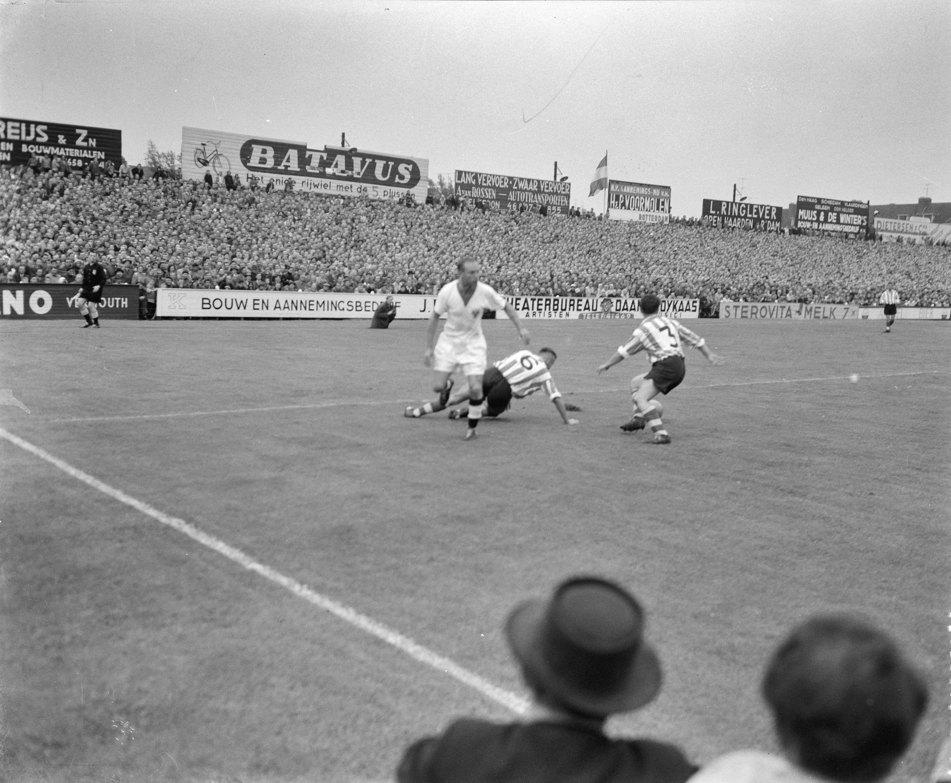 Collectie / Archief : Fotocollectie Anefo Reportage / Serie : [ onbekend ] Beschrijving : Voetbal Sparta tegen Blackpool met Stanley Matthews Datum : 15 augustus 1957 Locatie : Rotterdam Trefwoorden : sport, voetbal Persoonsnaam : Matthews, Stanley Fotograaf : Behrens, Herbert / Anefo Auteursrechthebbende : Nationaal Archief Materiaalsoort : Negatief (zwart/wit) Nummer archiefinventaris : bekijk toegang 2.24.01.04 Bestanddeelnummer : 908-8707